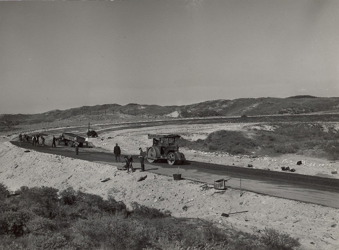 De aanleg van het nieuwe circuit. Aangekocht in 1977 van fotograaf C. de Boer. Identificatienummer 54-004057